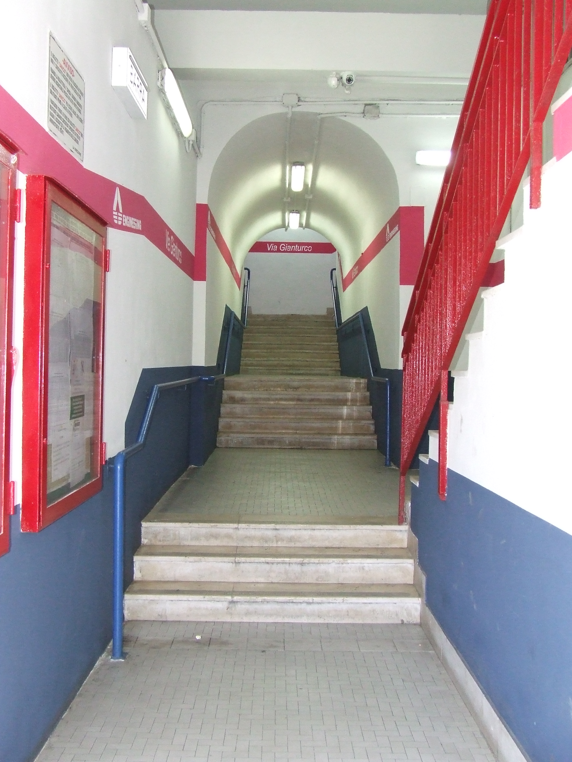 Stazione Via Gianturco, linea Napoli - Pompei, Circumvesuviana, EAV - interno